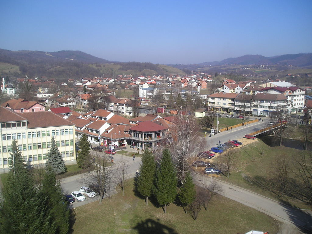 Поглед на Челинац са цркве